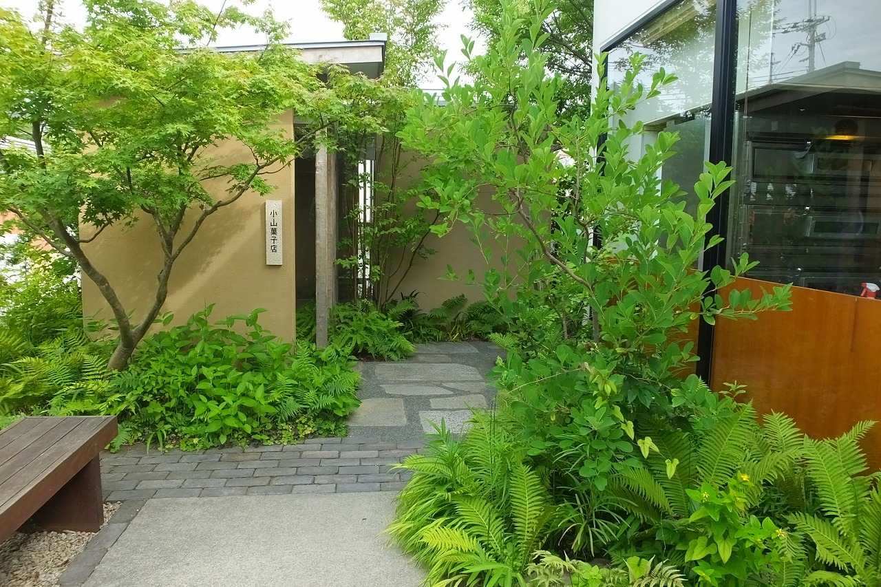 PATISSIER eS koyama - 小山菓子店 パティシエ エス コヤマ 小山進